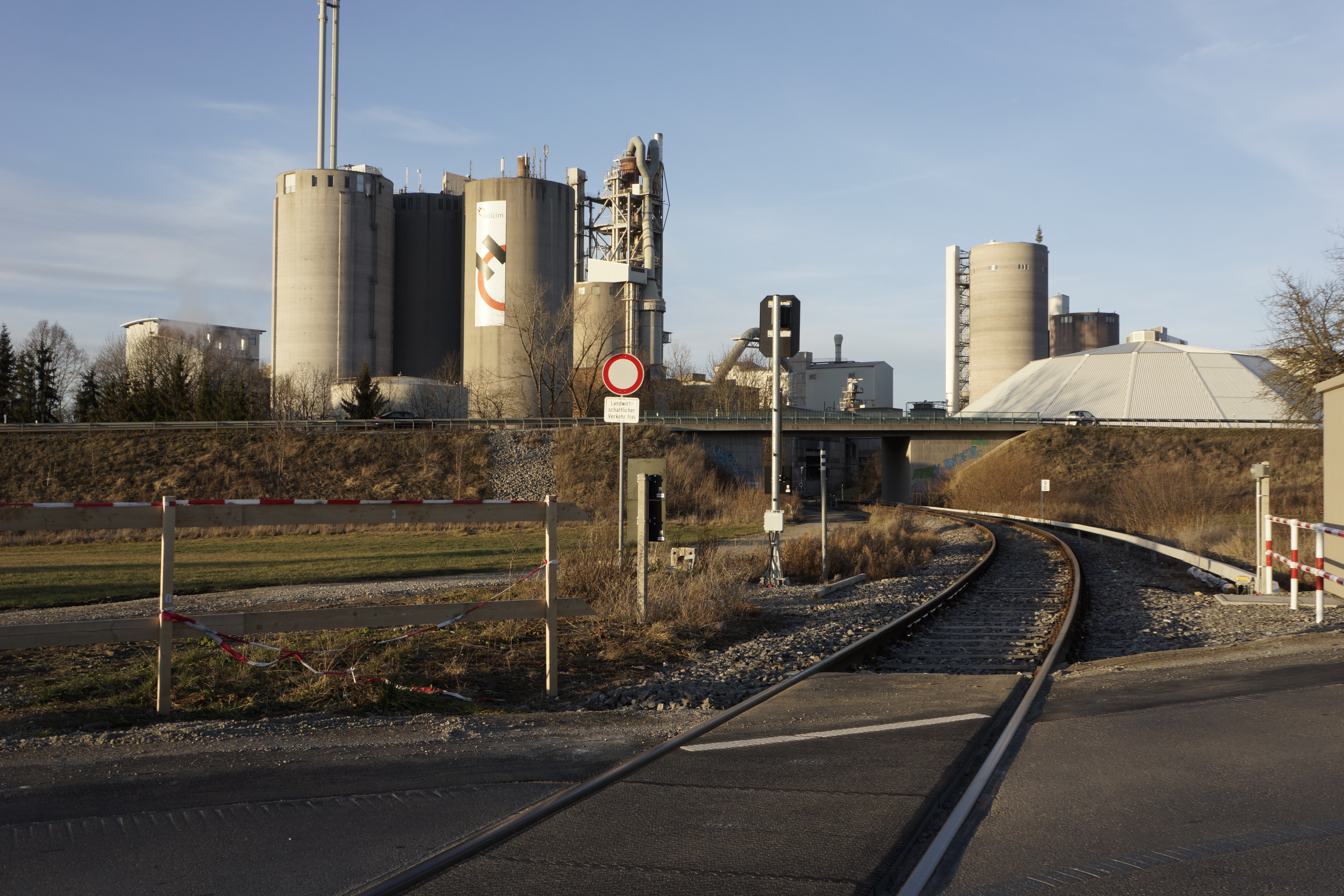 Fábrica de cemento en Dotternhausen, Zollernalb Kreis, Baden- Württemberg (Alemania)